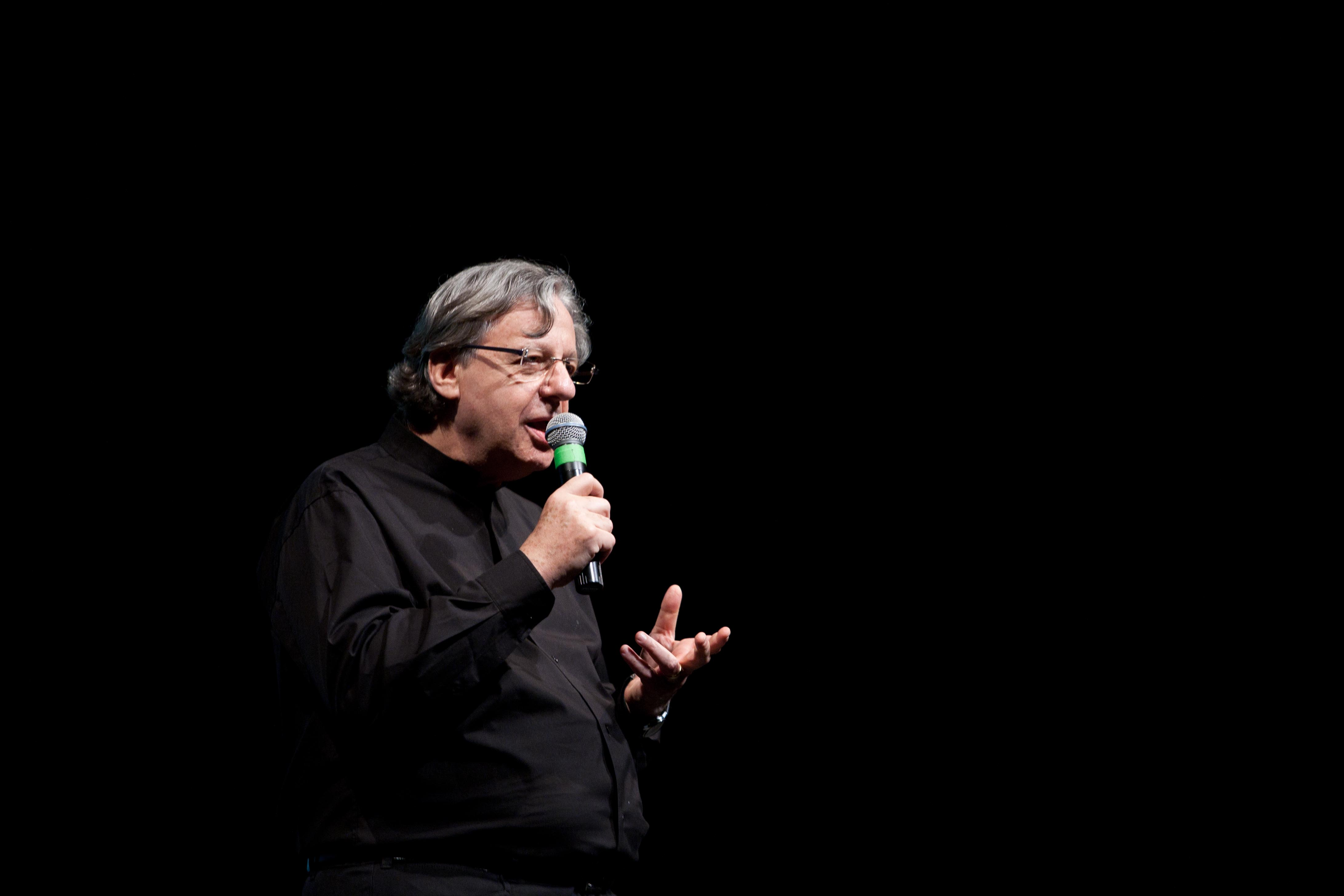 Maestro John Neschling na apresentação da Companhia Brasileira de Ópera, no Palácio das Artes em Belo Horizonte. Foto: Pedro França/MinC